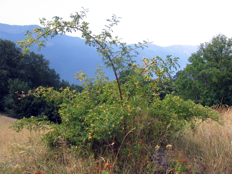 Divlja ruža sa Biogradske gore